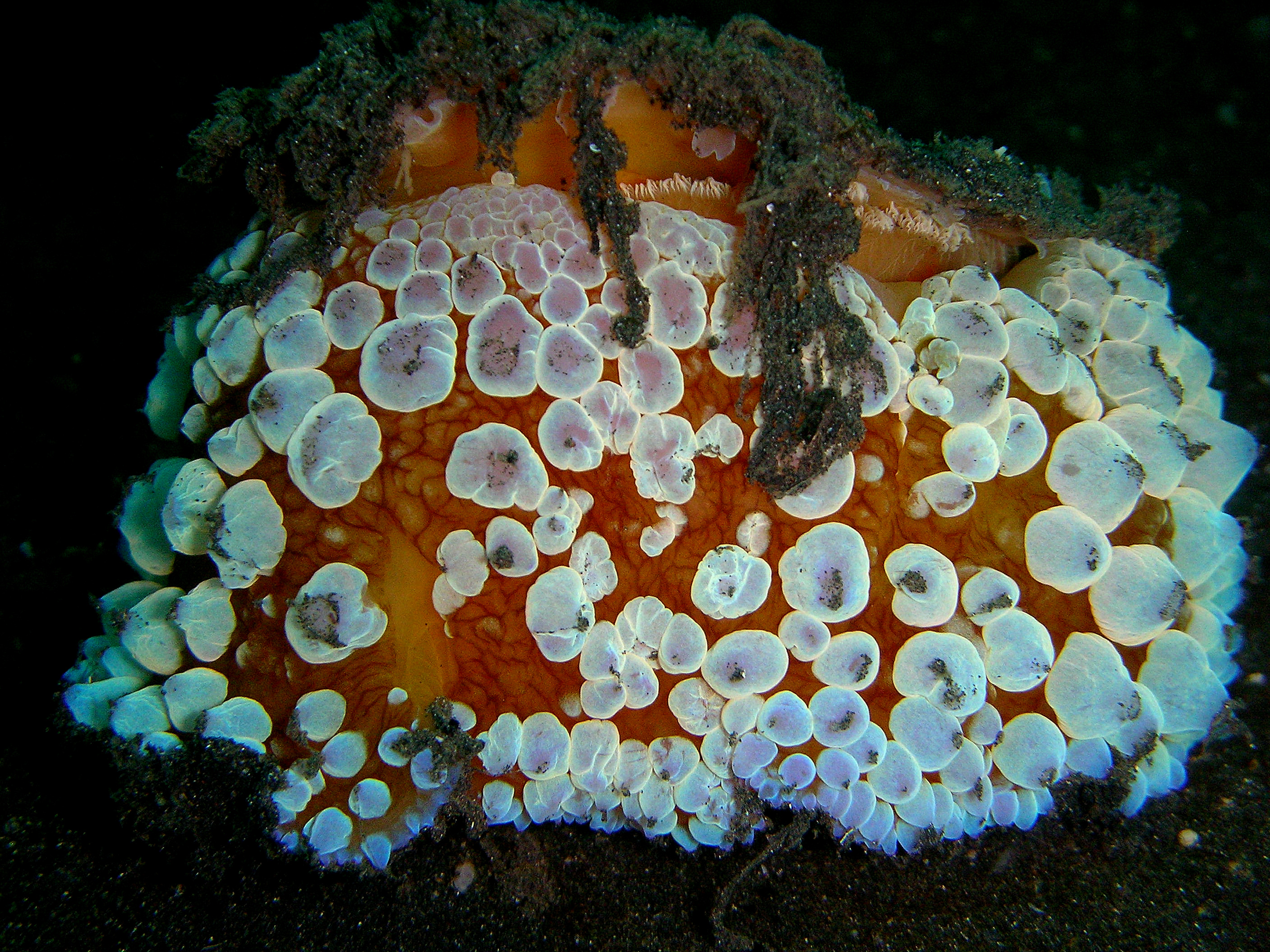 Umbraculum umbraculum Bitung, North Sulawesi, ID.